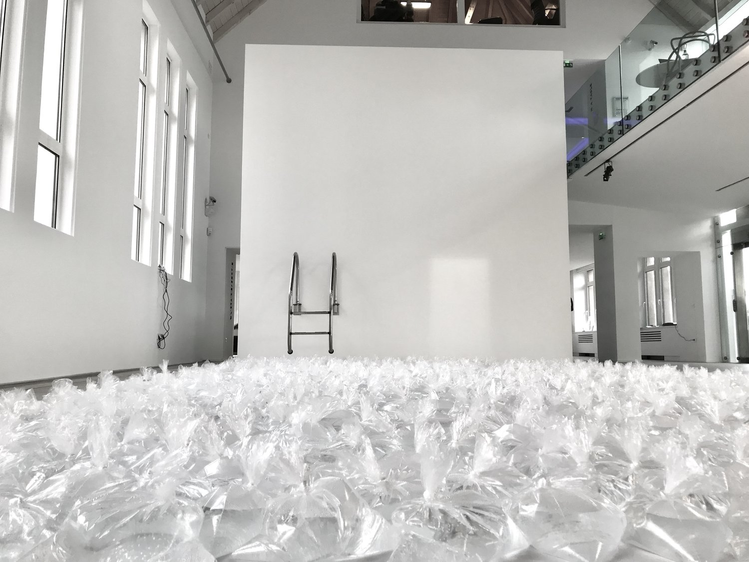 Memory of water Contemporary Talents 7th edition